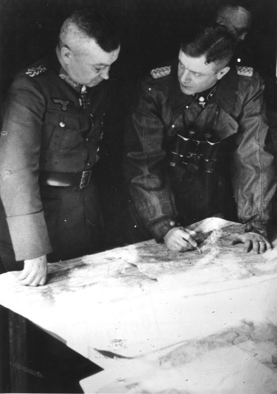 Scherl: Auf einem Divisionsgefechtsstand während des Kämpfe um Arnheim. Generalfeldmarschall Model bespricht mit Eichenlaubträger SS-Brigadeführer Harmel, Kommandeur der SS-Panzerdivision "Frundsberg", die Gefechtslage. Bei Abdruck nennen: SS-PK-Kriegsberichter Adendorf 4.10.44 [Herausgabedatum], (1315-44) ADN-ZB/Archiv II.Weltkrieg 1939-45, Schlacht um Arnheim (Holland vom 17. - 27.9.1944. Die am 17.9.1944 begonnene aliierte Luftlandeoperation bei Arnheim sollte die Übergänge über Rhein, Maas und Waal sichern. Nach großen Verlusten wurden die gelandeten Truppen Ende September zurückgezogen. Generalfeldmarschall Walter Model (l.), Oberbefehlshaber West, bespricht mit SS-Brigadeführer Heinz Harmel, Kommandeur der SS-Panzerdivision "Frundsberg", auf dem Divisionsgefechtsstand die Lage. Aufnahme: Adendorf